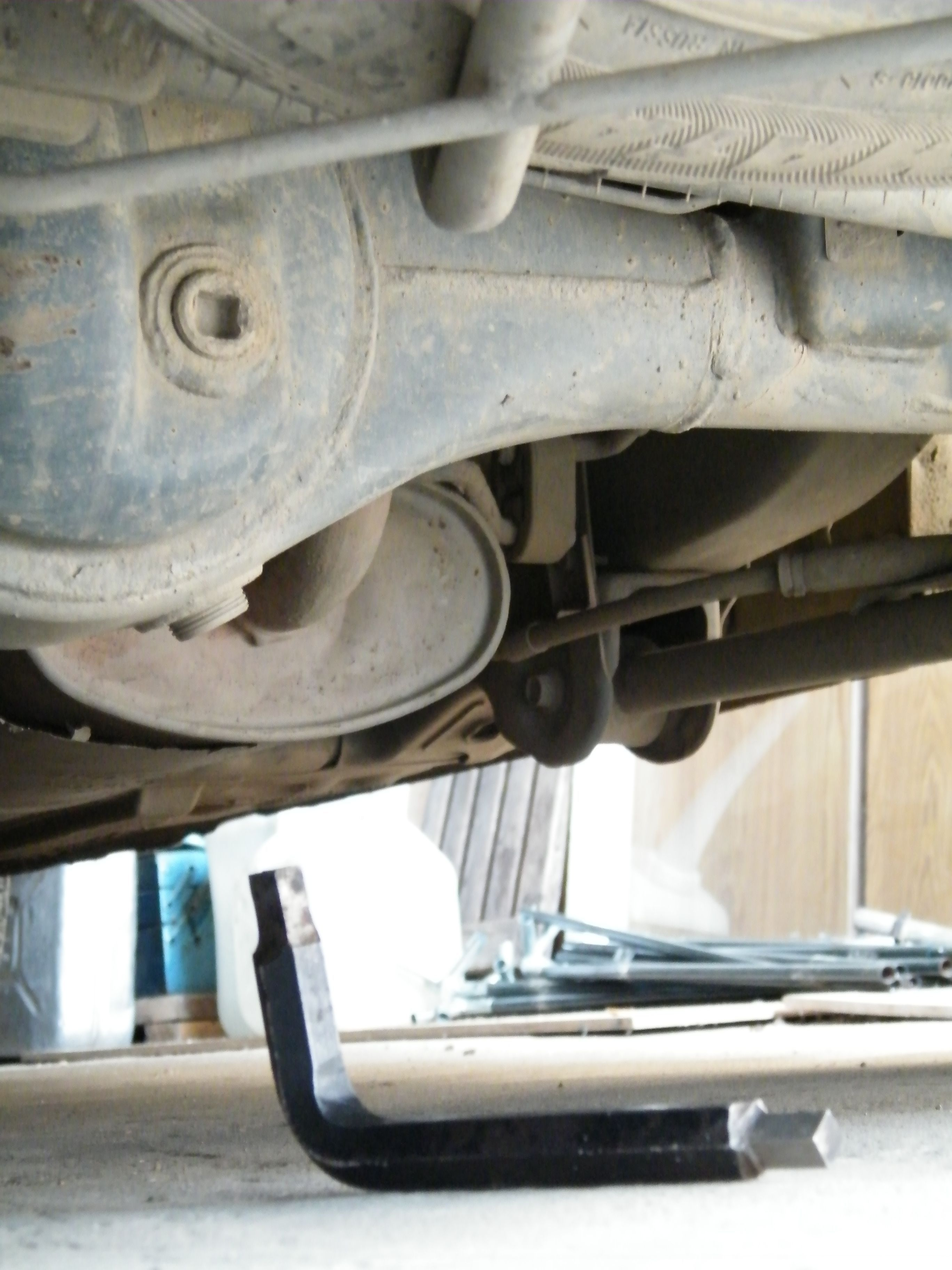 Самодельный квадратный ключ